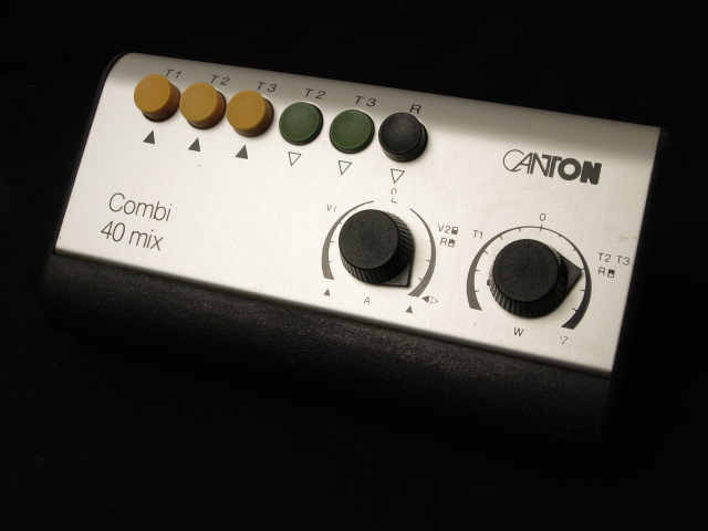 Das Canton Combi 40 mix dient zum Zusammenschalten von bis zu drei Tonbandgeräten und einer weiteren hochohmigen Tonquelle an einem oder zwei Verstärker, Regler dienen zur Anpassung unterschiedlicher Pegel, Anschluss über 5-polige DIN-Stecker